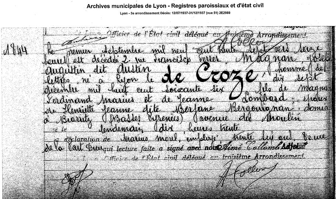 etat civil de Lyon